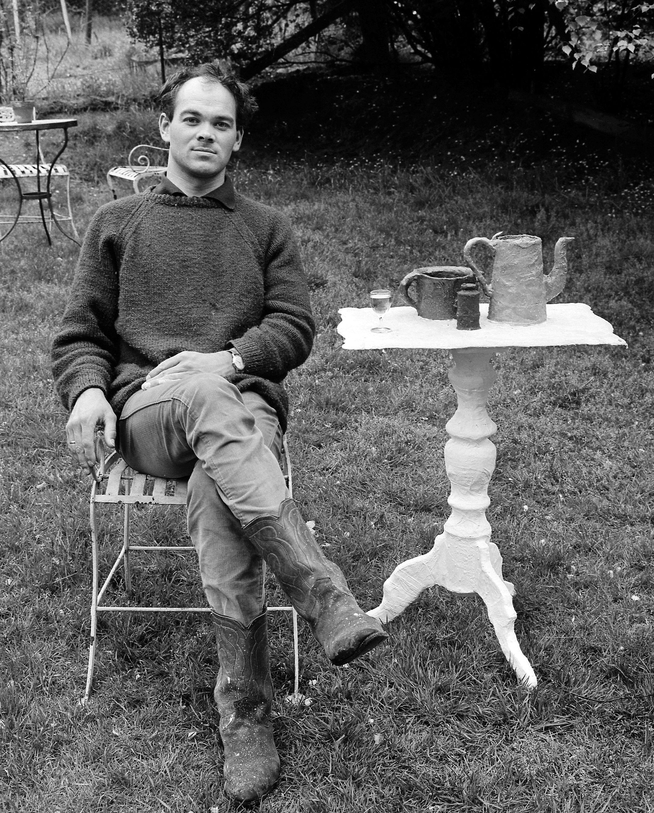 Klaas Gubbels met tafeltje waarop een stilleven van geboetseerde kannen